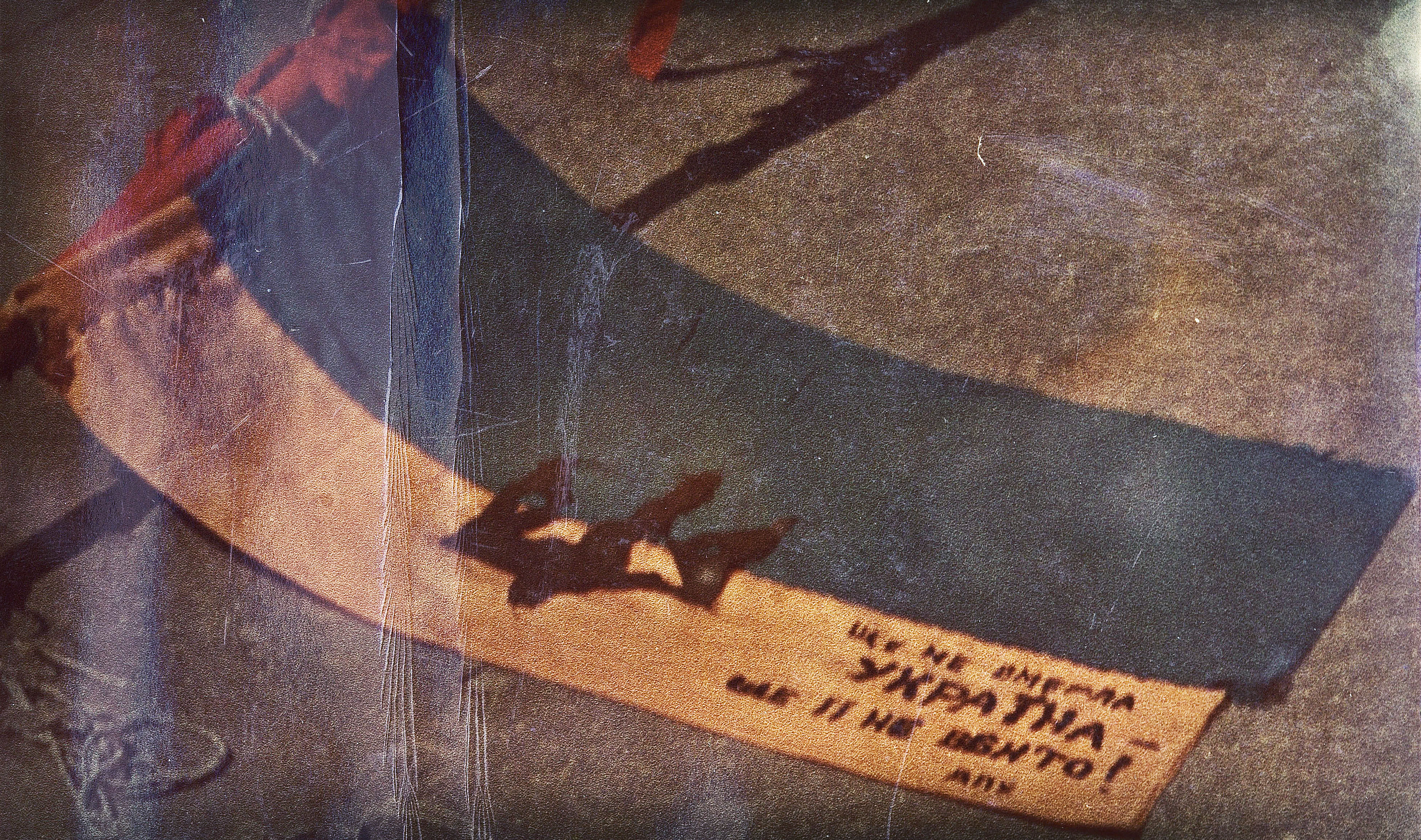 У ніч проти 1 травня 1966 року, напередодні Дня солідарності трудящих, Г. Москаленко й В. Кукса скинули і порвали червоний прапор і встановили синьо-жовтий стяг над будівлею центрального корпусу Київського інституту народного господарства (нині – Київський національний економічний університет ім. В. Гетьмана). Напис на полотнищі: «Ще не вмерла Україна, ще її не вбито! ДПУ». «ДПУ» - «Демократична партія України»